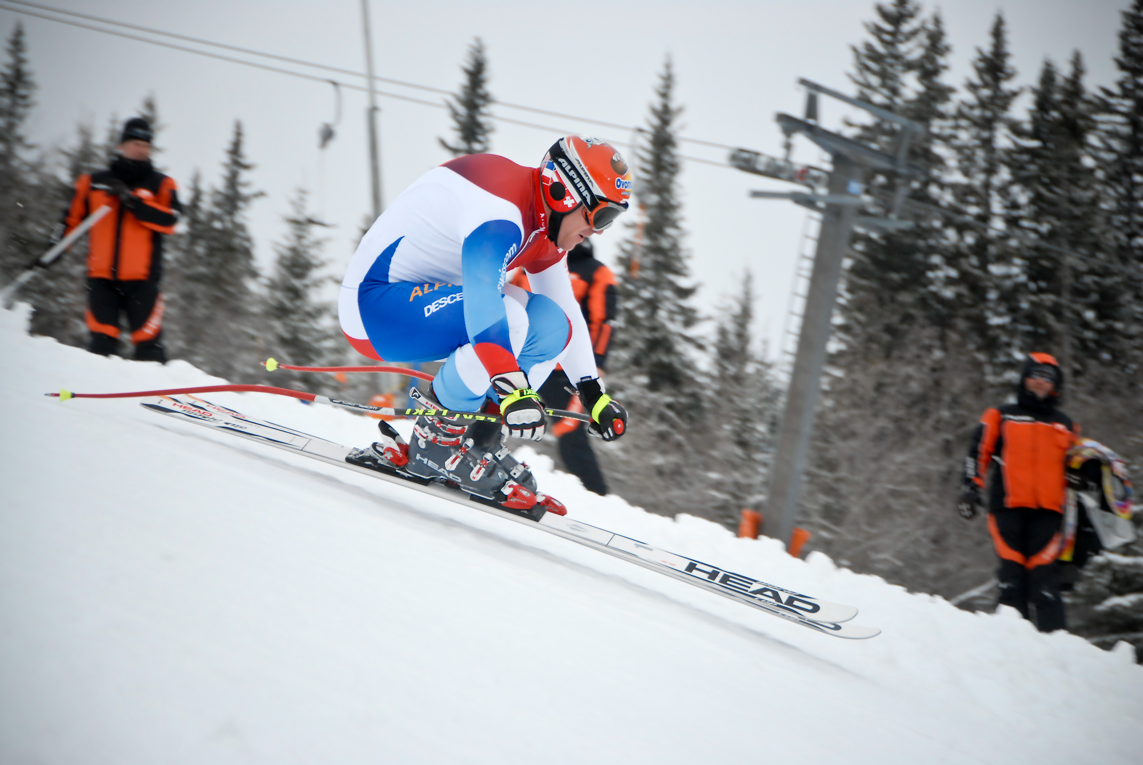 Didier Cuche trener i Høgegga Renn- og Treningssenter i Trysil. Foto: Ola Matsson